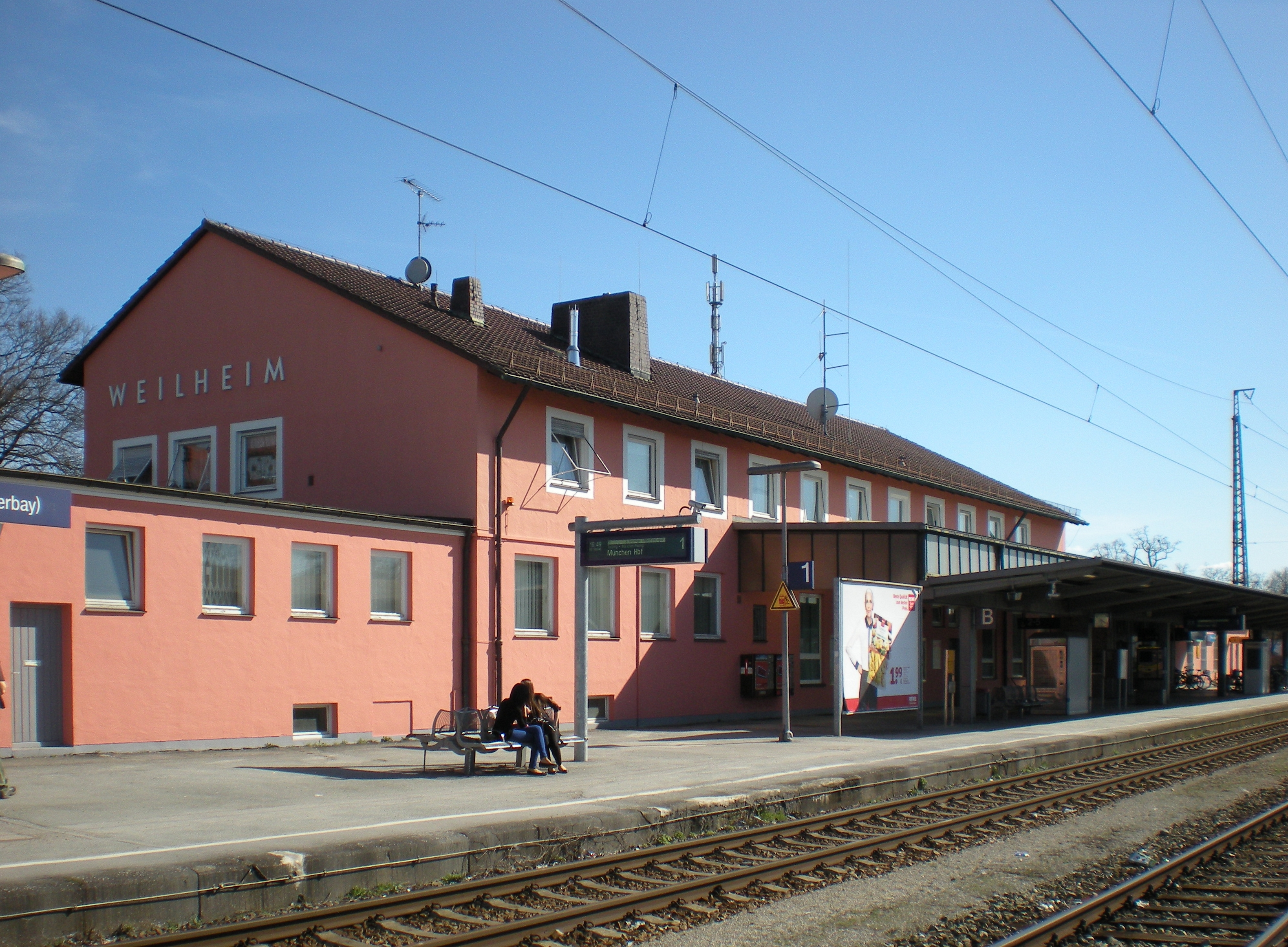 Gleisseite des Empfangsgebäudes des Bahnhofs Weilheim